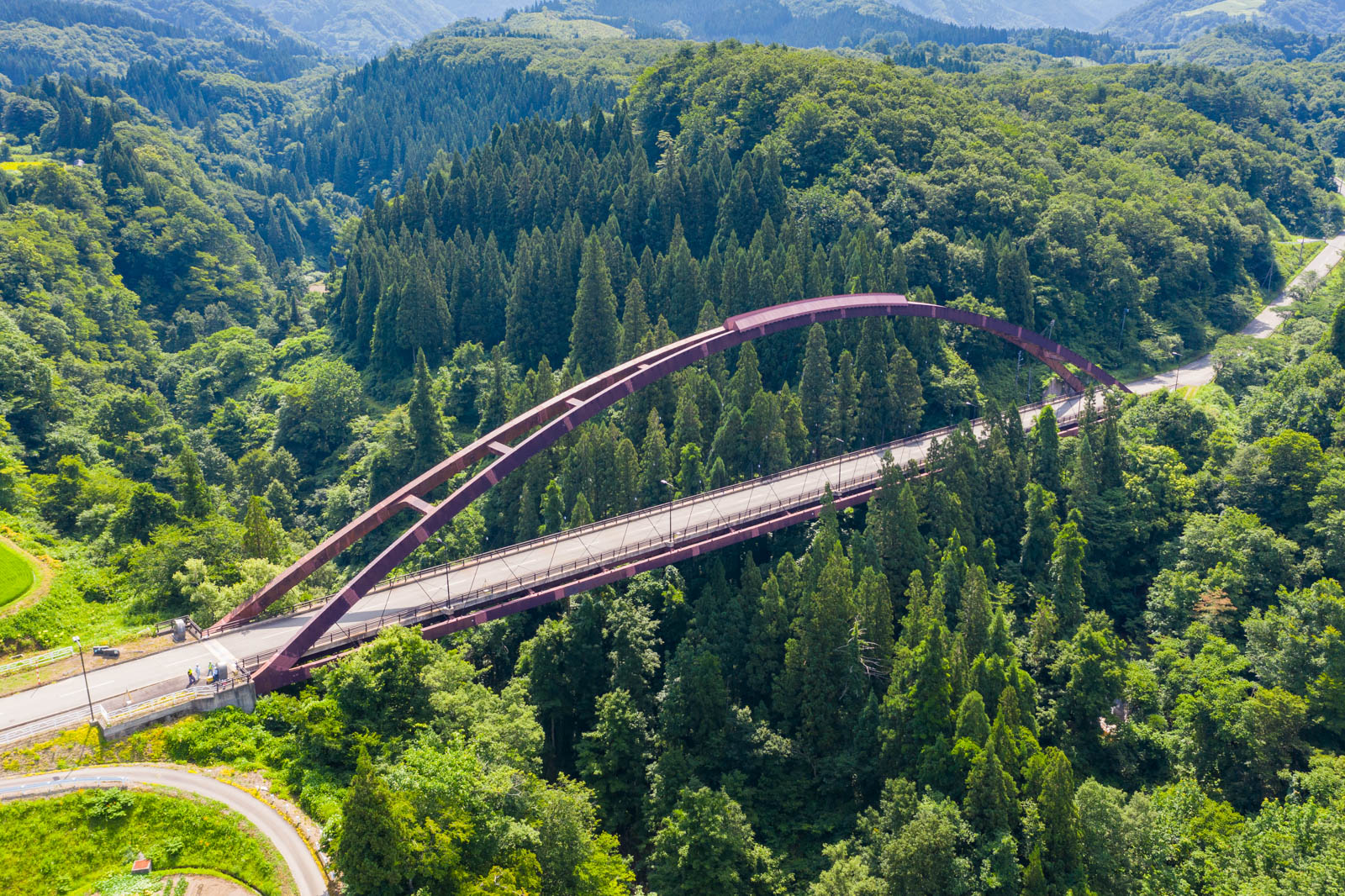 北東方向からドローンにて撮影